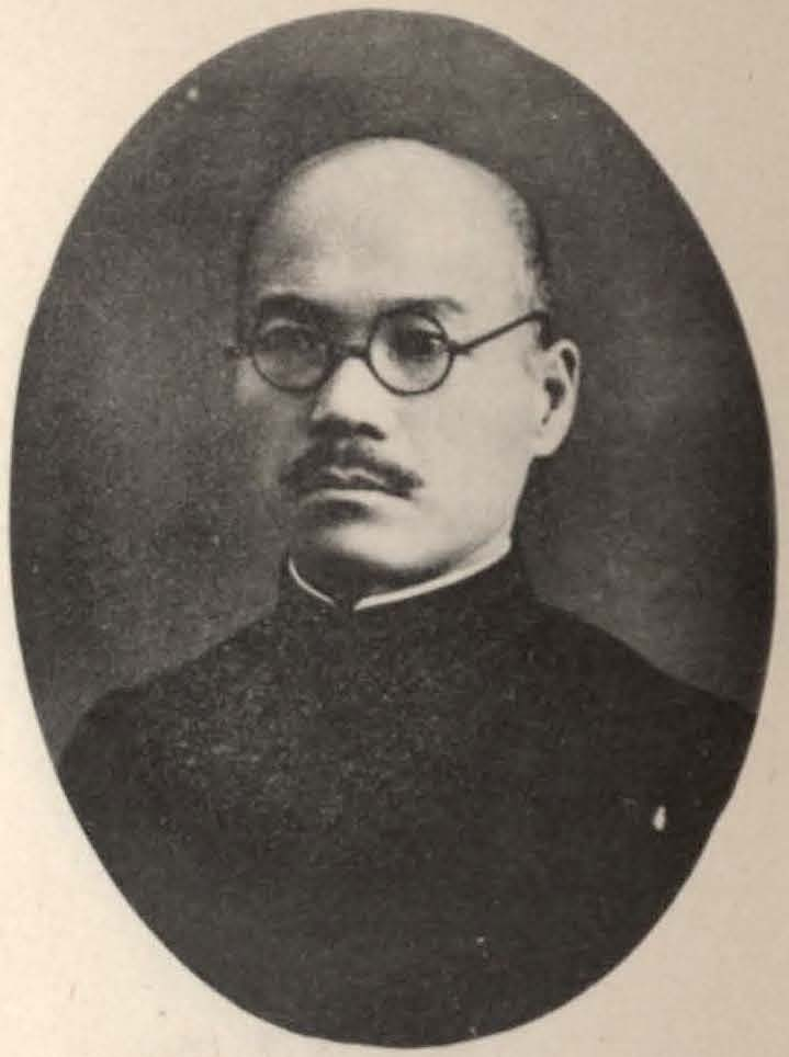 Bân-lâm-gú: 藤田 傊治郎 Fujita Unjirō